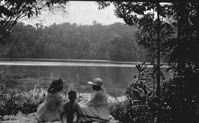 Foto. Aan de oever van het meer van Sangiang op de hellingen van de vulkaan Tjareme, West-Java